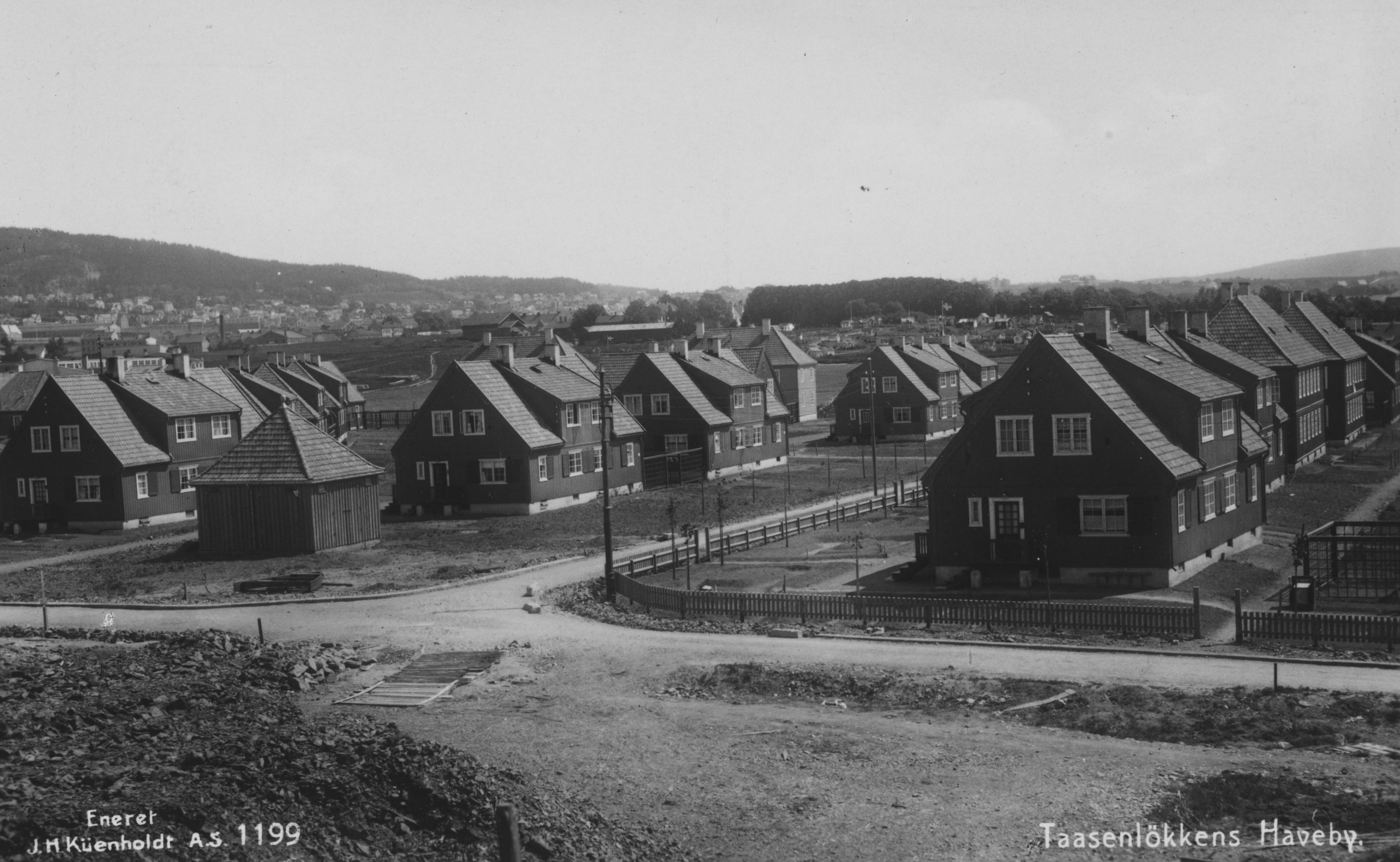 Bildet er hentet fra Nasjonalbibliotekets bildesamling Tåsen, Oslo, Oslo